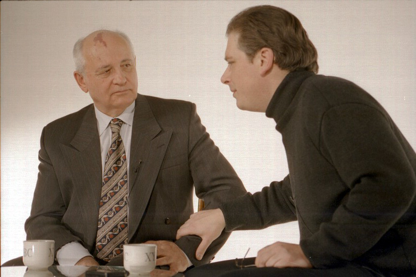 Лушников